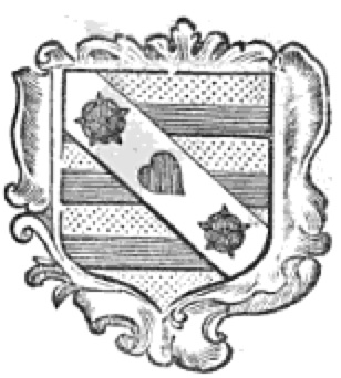 livre ancien présentant le nobiliaire etarmorialdeLorraine